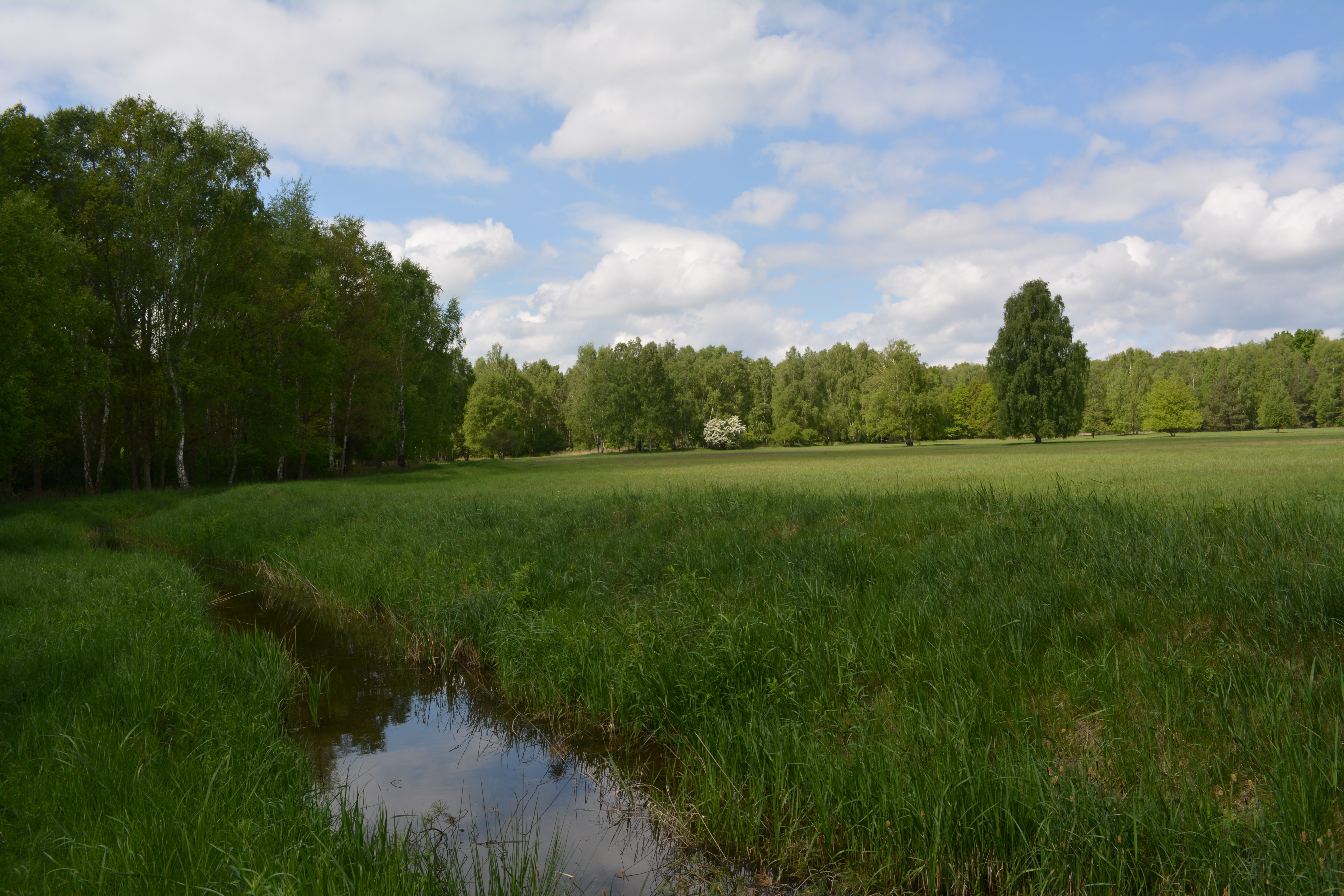 Blick auf das Landschaftsschutzgebiet Eiskeller vom Mauerweg in Berlin-Spandau